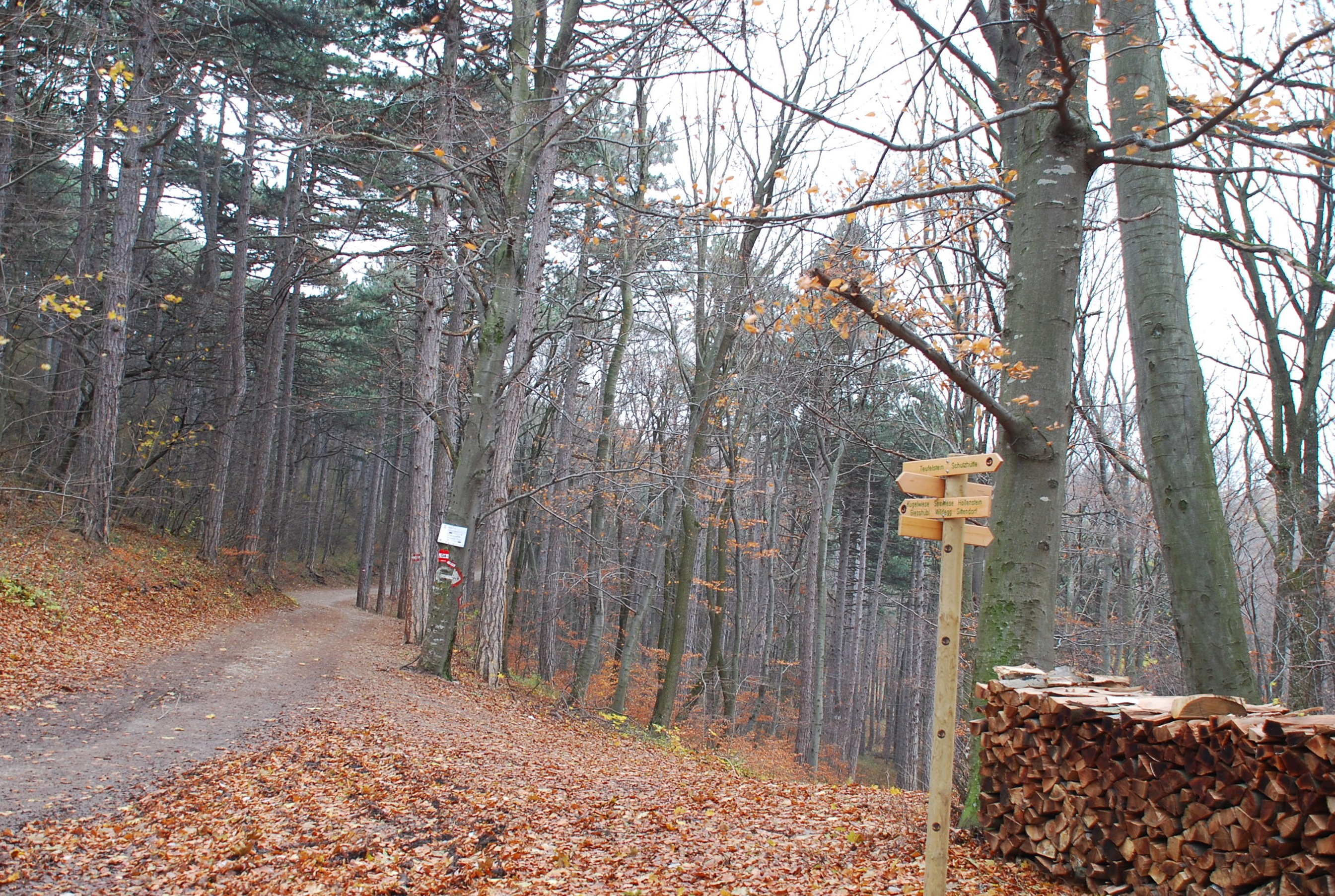 Wege beim Teufelstein